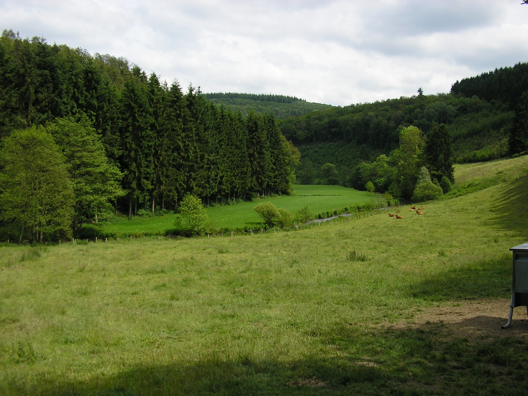 Das Clervetal bei Alscheid, Gemeinde Kiischpelt, Luxemburg